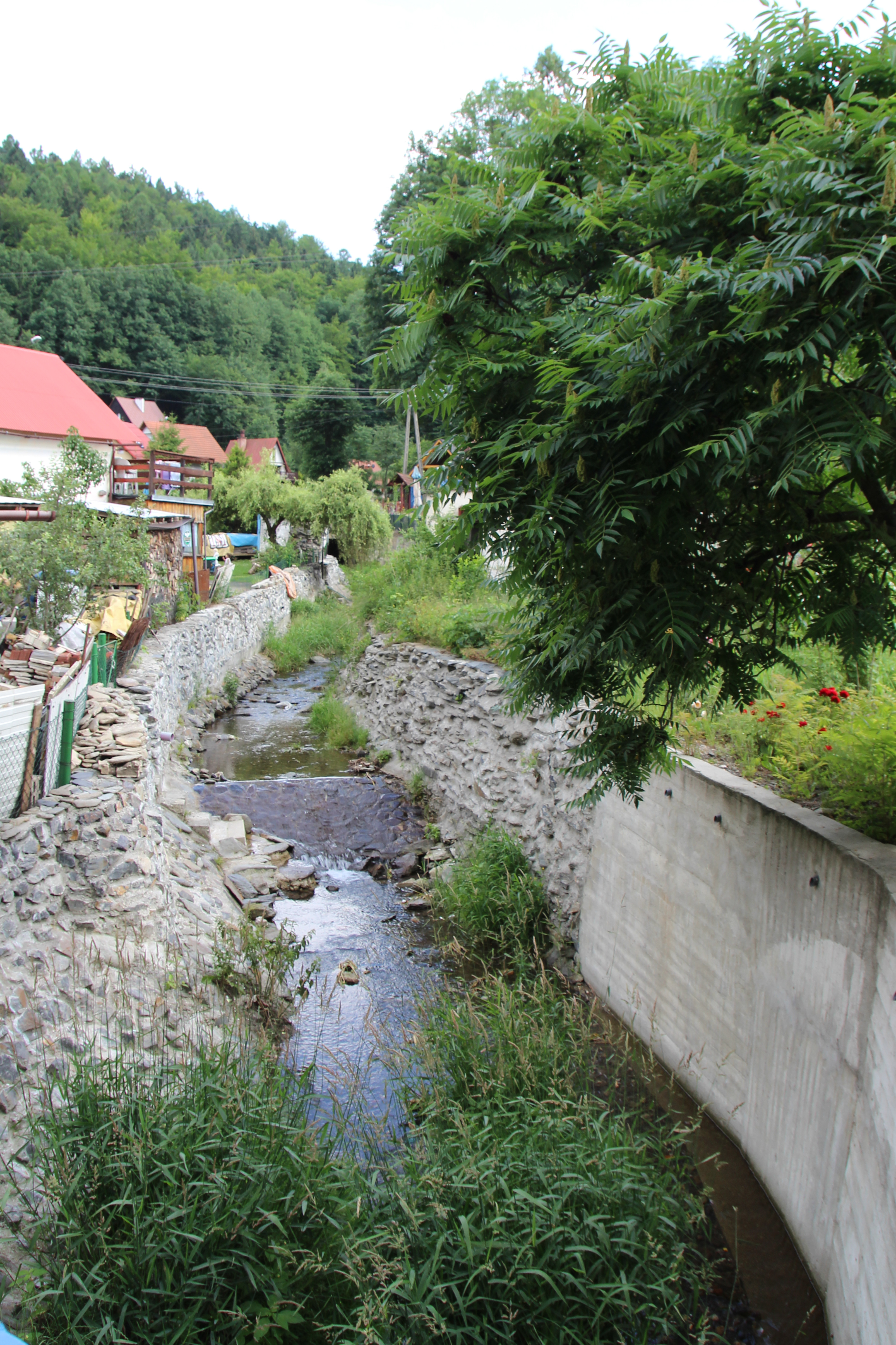 Złoty Potok (Zlatý potok) w Pokrzywnej - wieś w Polsce w województwie opolskim, w powiecie nyskim w gminie Głuchołazy.